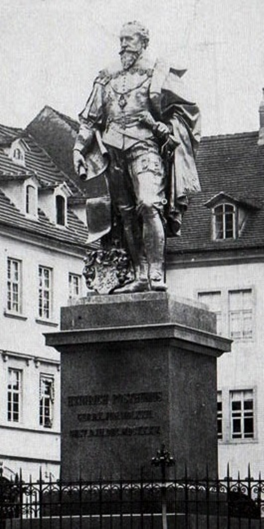 Gera, Johannisplatz, Denkmal Heinrich Posthumus Reuß, errichtet 1863, zerstört 1958